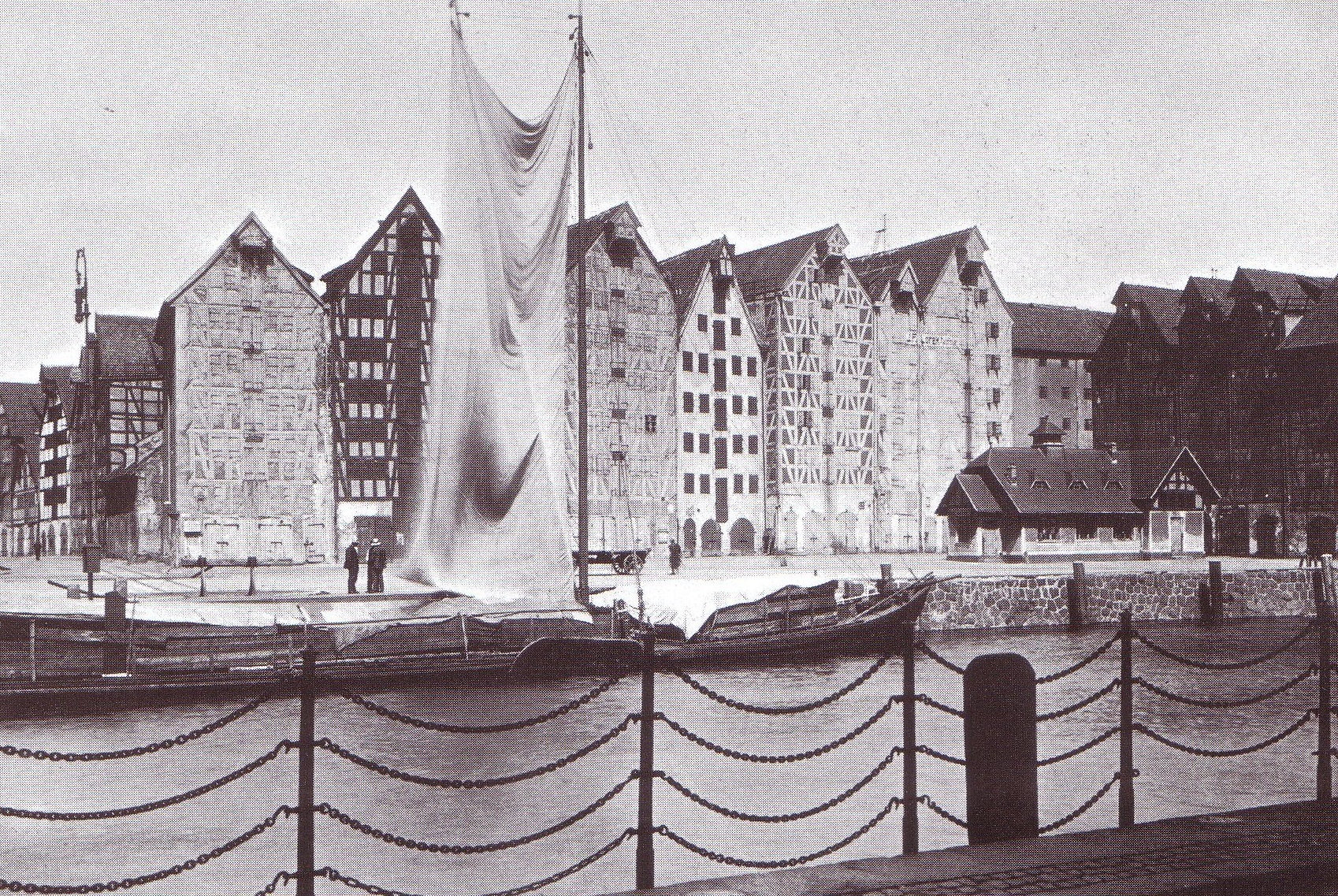 Wittine (ein Lastkahn) vor der Lastadie in Königsberg i. Pr.